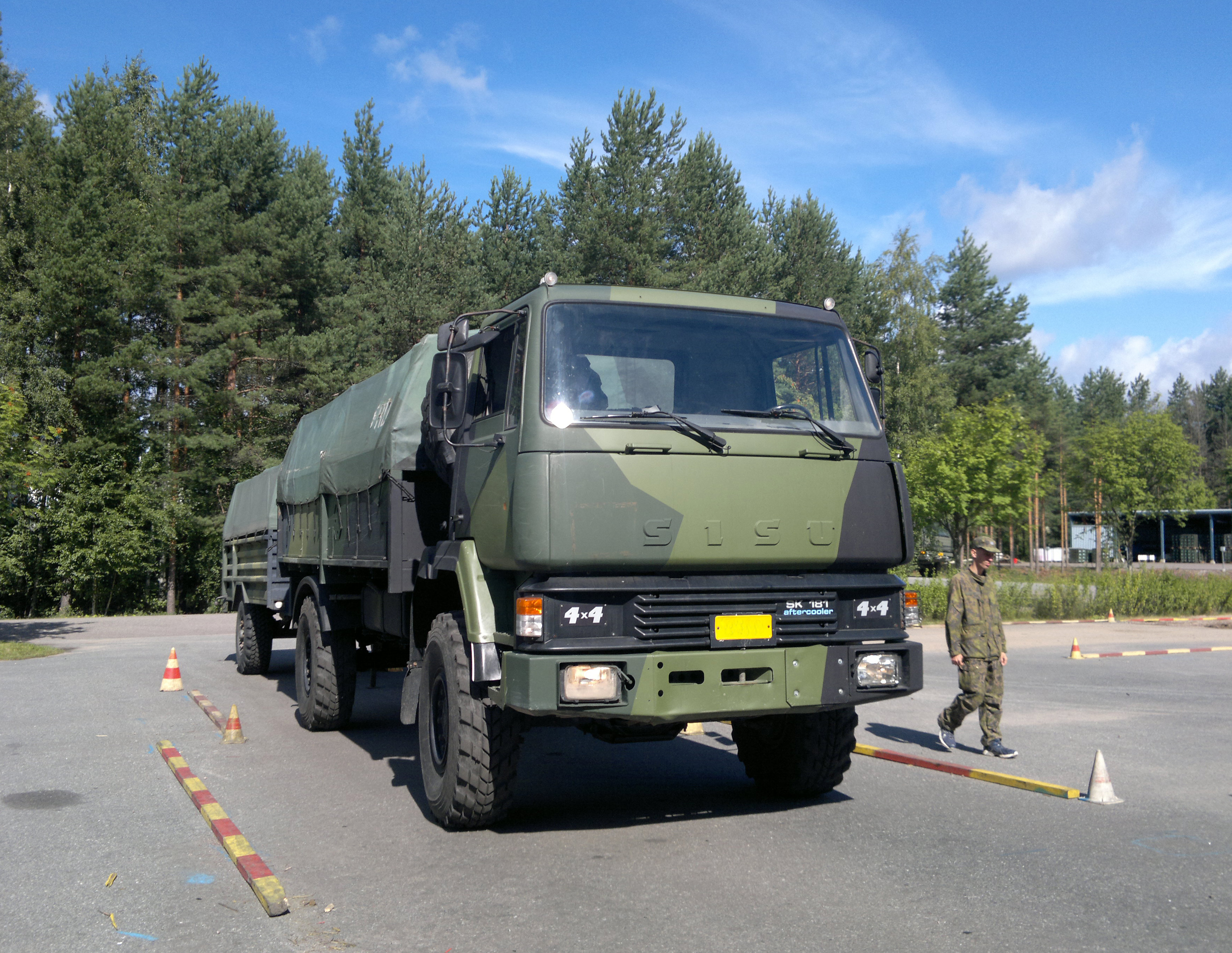 Sisu SK181 -maastokuorma-auto